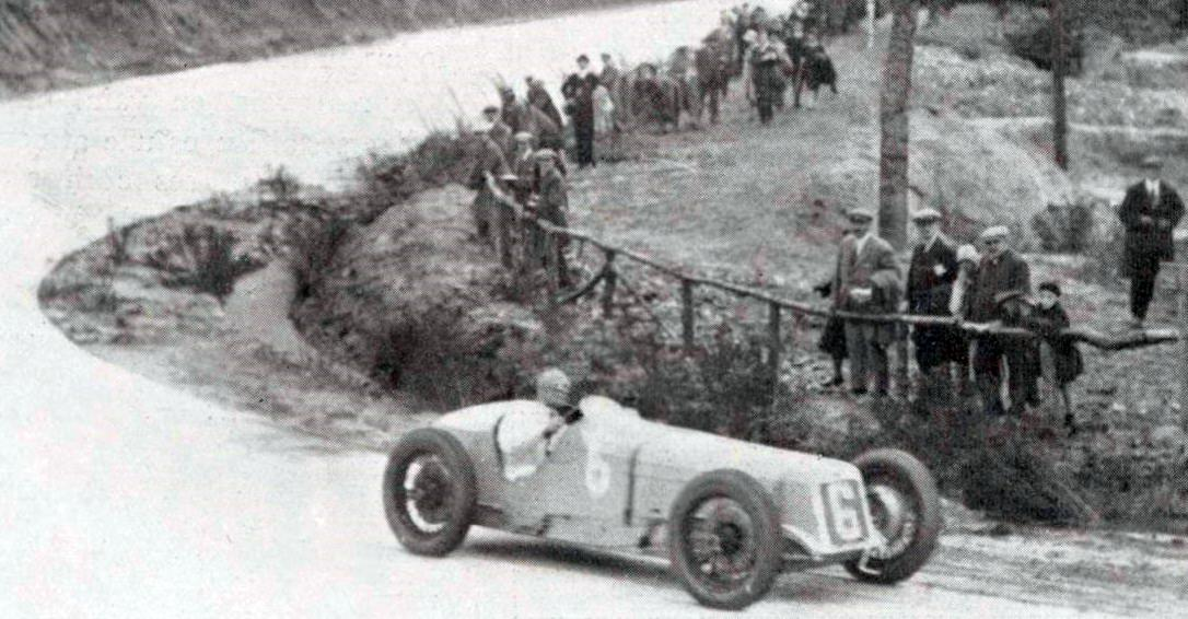 Robert Benoist au virage de Couard sur Delage (victoire au GP de l'A.C.F. 1927).